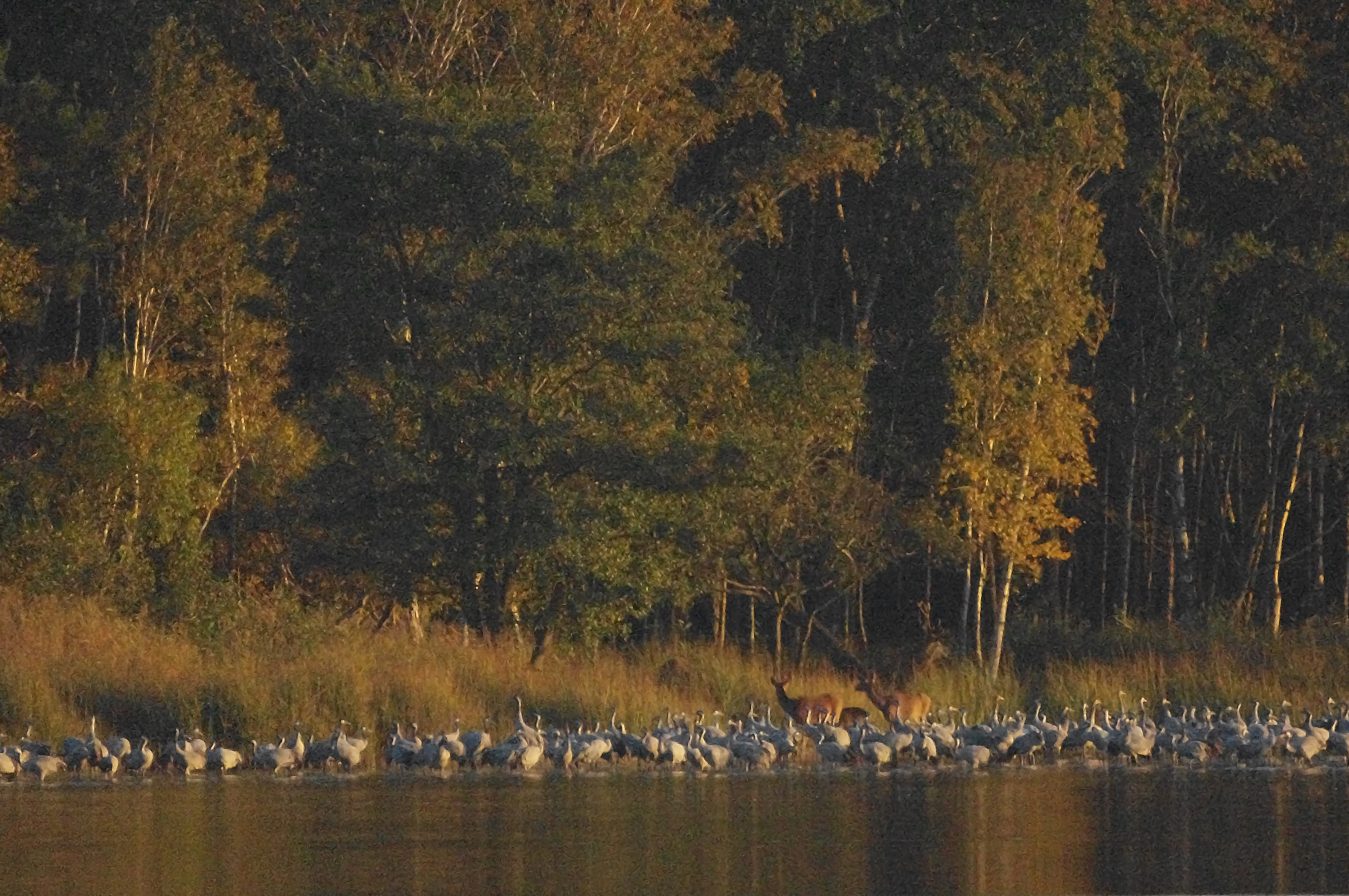 Von der Beobachtungsplattform am Rederangsee (Müritz Nationalpark) kann man bei Führungen im Herbst tausende Kraniche sehen. Hier gehen Hirsche zwischen den Kranichen hindurch.